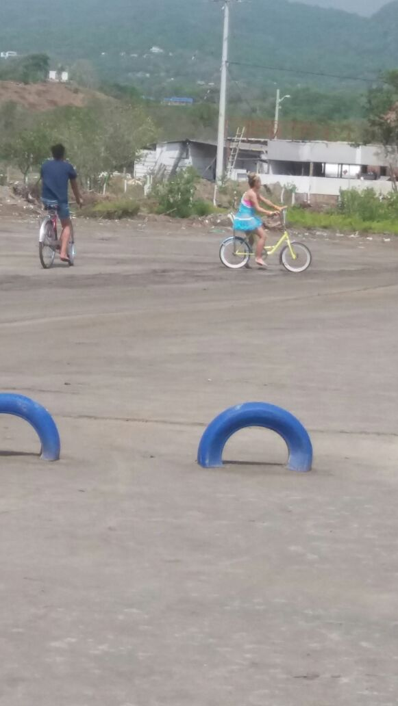 Grabación del vídeo de «La Bicicleta» en Puerto Velero, Atlántico